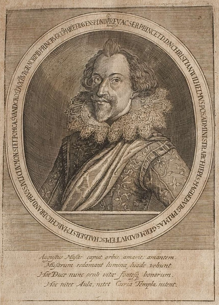 Christian Wilhelm von Brandenburg, Administrator des Erzstifts Magdeburg. In: Historischer Chronicken Continuation Oder Warhaffte Beschreibung aller denckwürdigen Geschichten : so sich hin und wider in der Welt/ vom Jahr Christi 1629. biß in das Jahr 1633. zugetragen. Frankfurt a.M. (Merian) 1633, S. 233